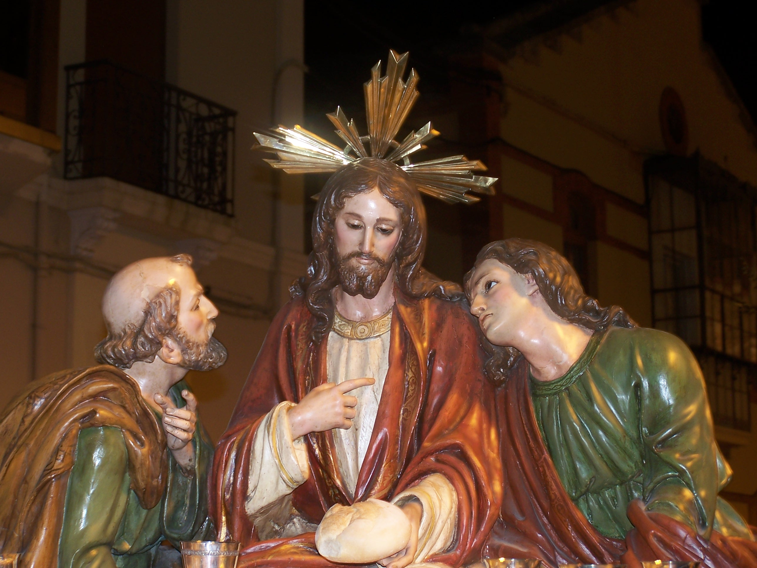 Detalle de la Santa Cena, que procesiona el Miércoles Santo en Astorga (León, España).